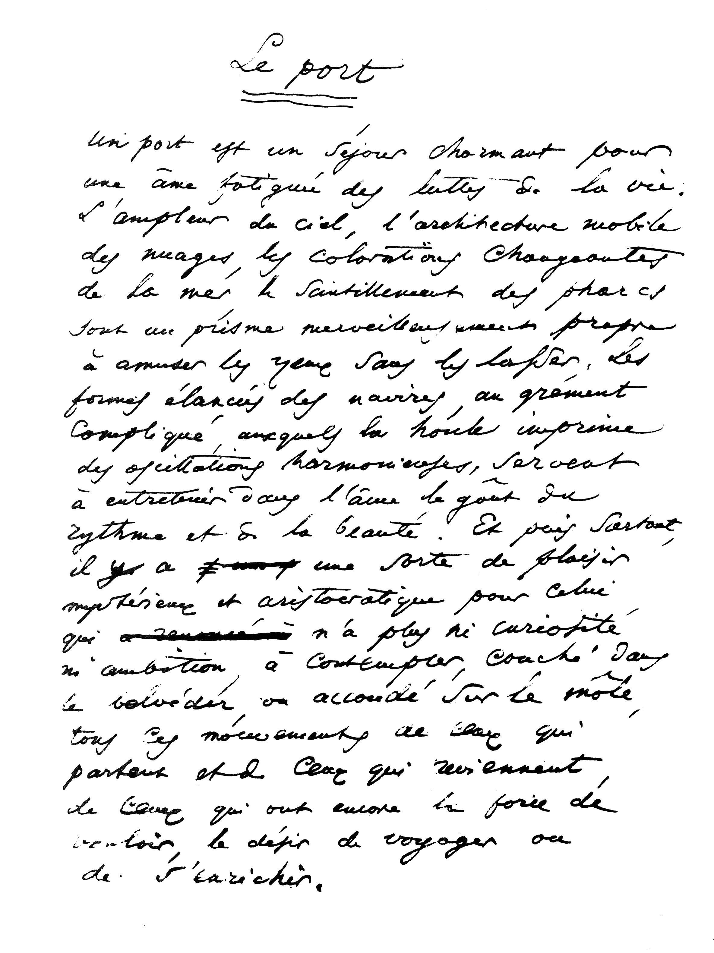 Manuscrit del poèma El port, de Petits poèmes en prose 1862